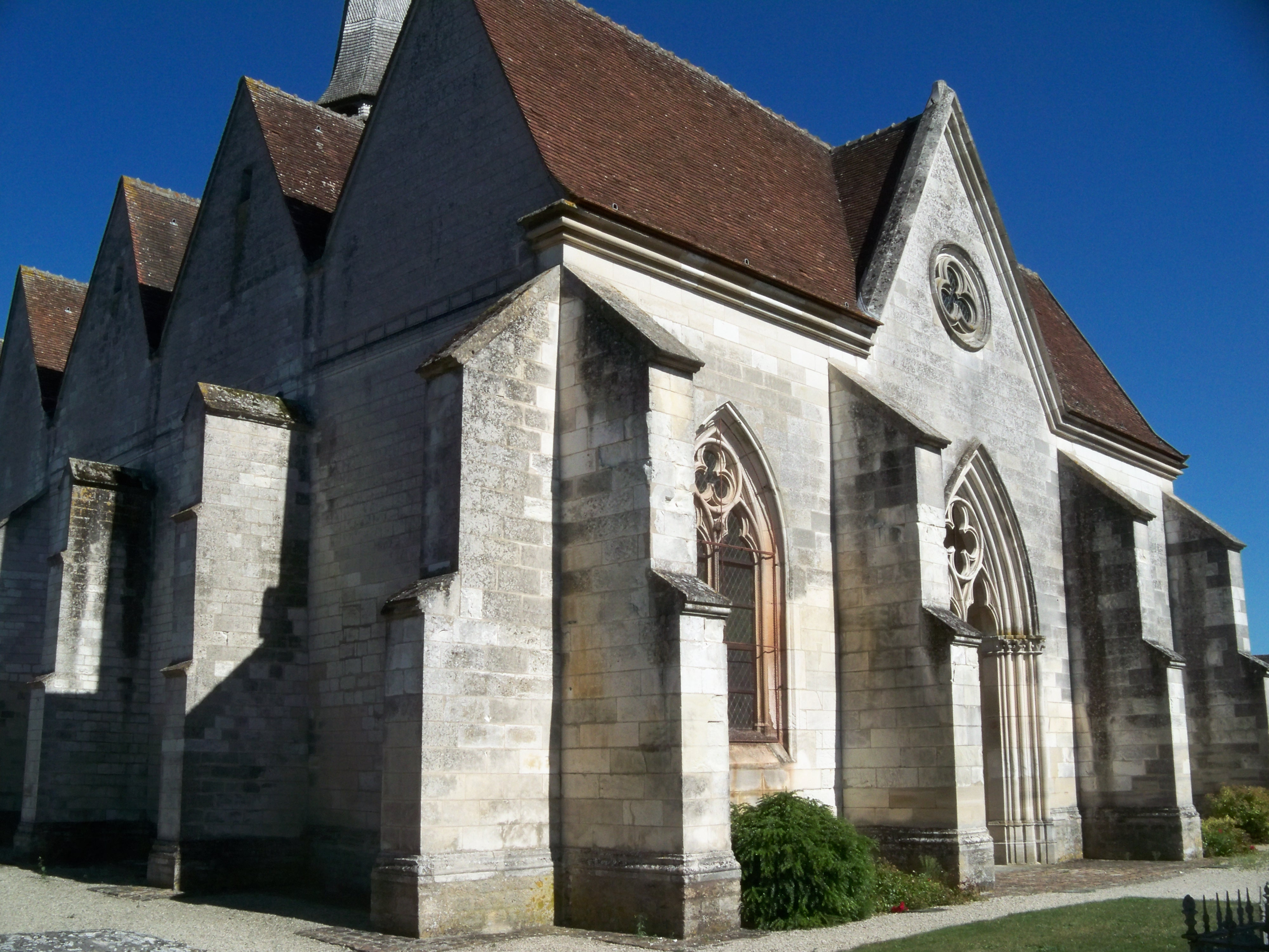 L'église Saint-Aventin de Creney-près-Troyes, monument de culte classé par arrêté du 6 mai 1907. .